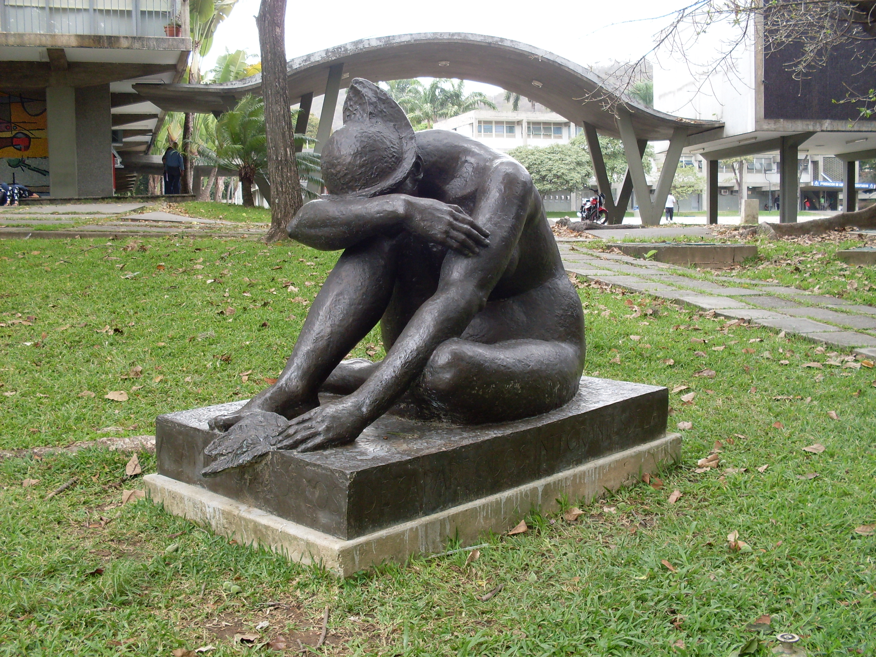 Escultura de Ernest Maragall. Título: Monumento a los caídos de la generación del 28. Autor: Ernest Maragall. Año: 1978. Ubicación: Tierra de nadie, al este del rectorado.